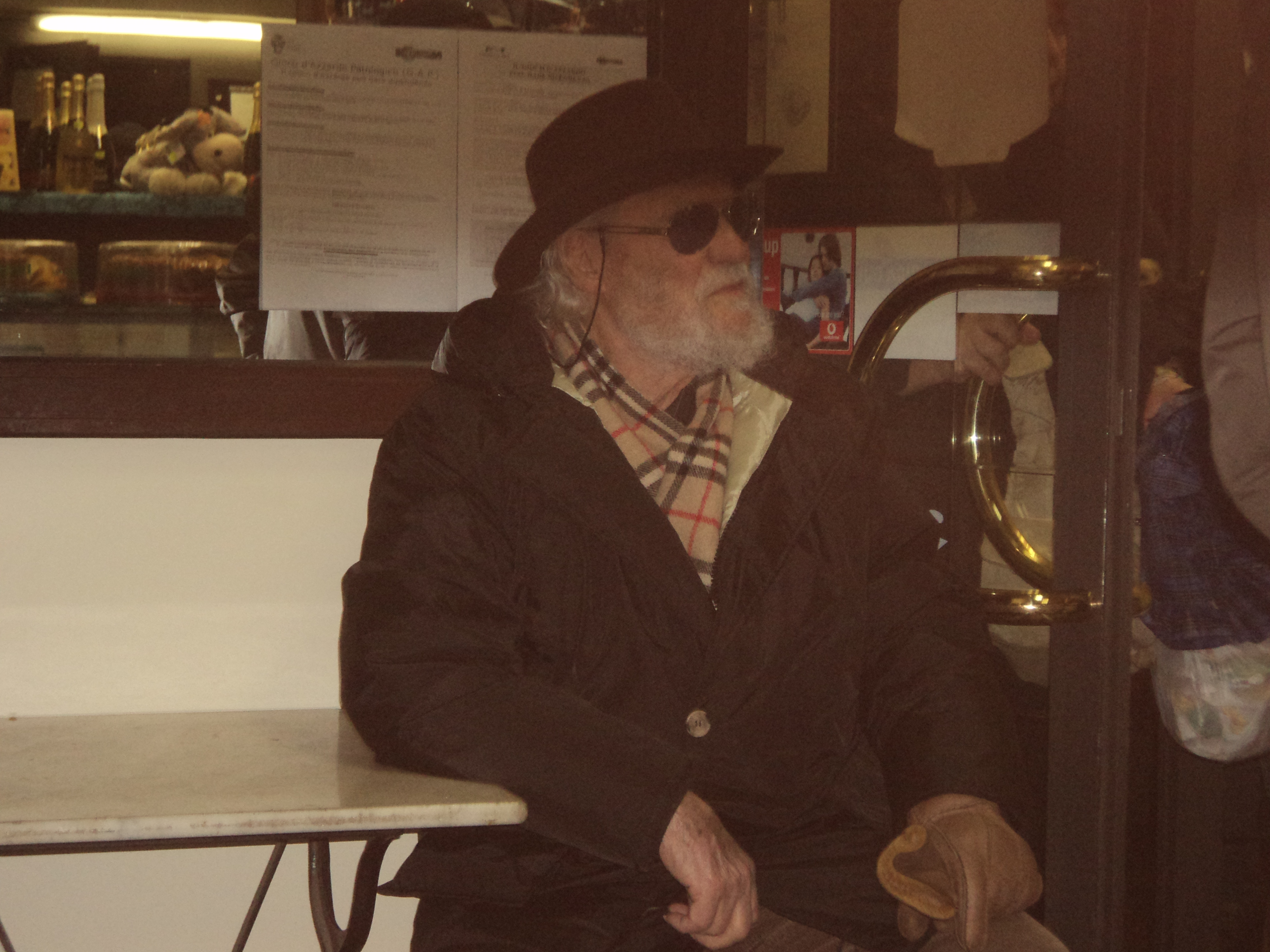 L'attore Remo Capitani